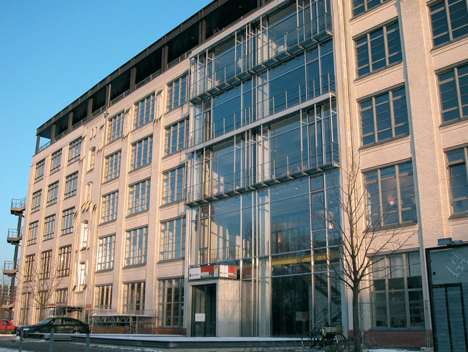 Deutsches Architektur Zentrum DAZ